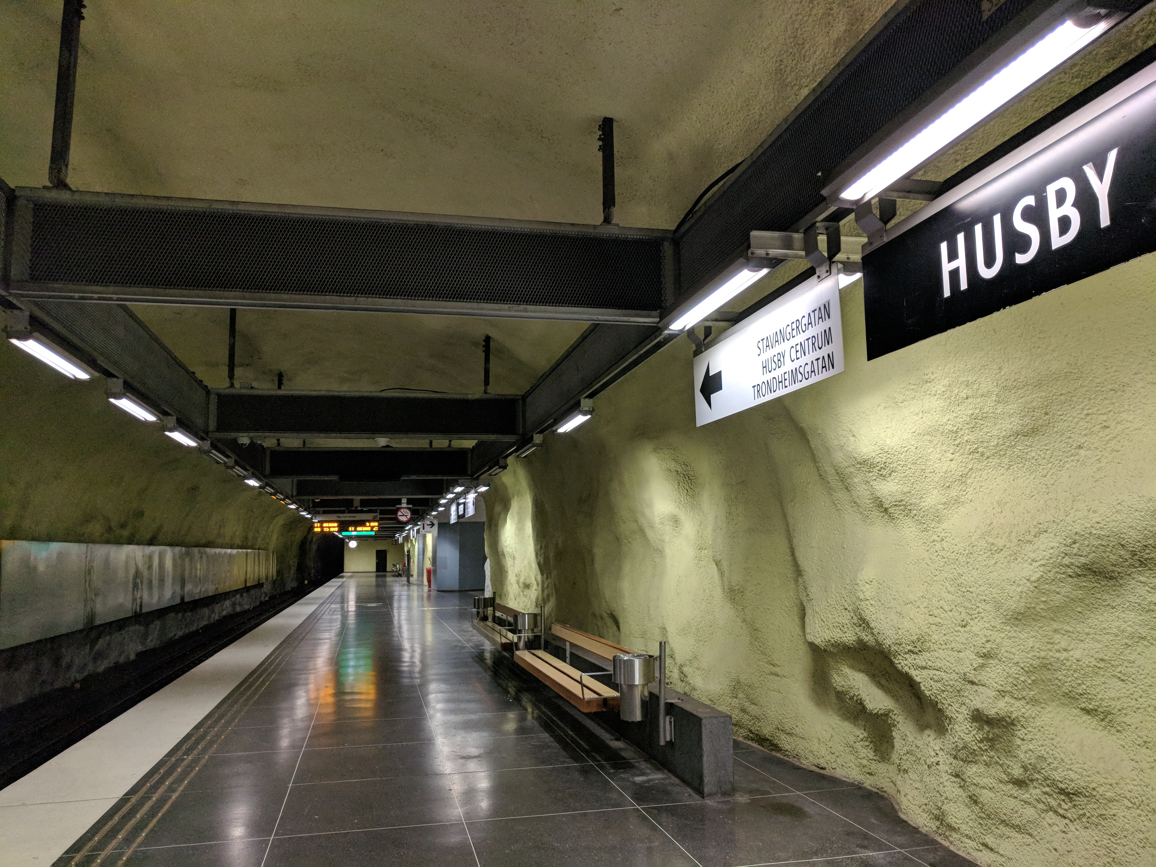 Husby tunnelbana